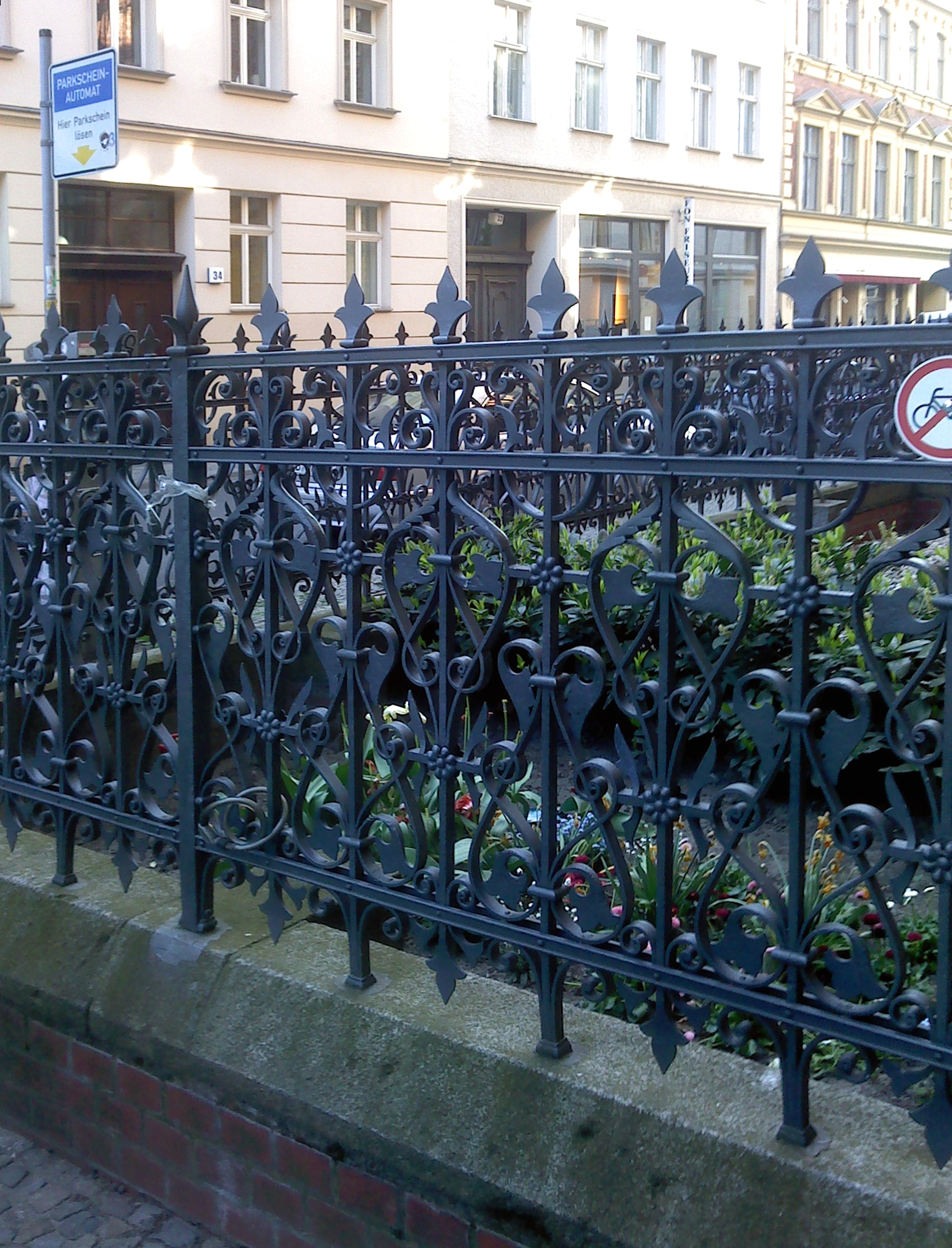 St. Hedwig-Krankenhaus: Umzäunung Vorderhaus in der Großen Hamburger Str.